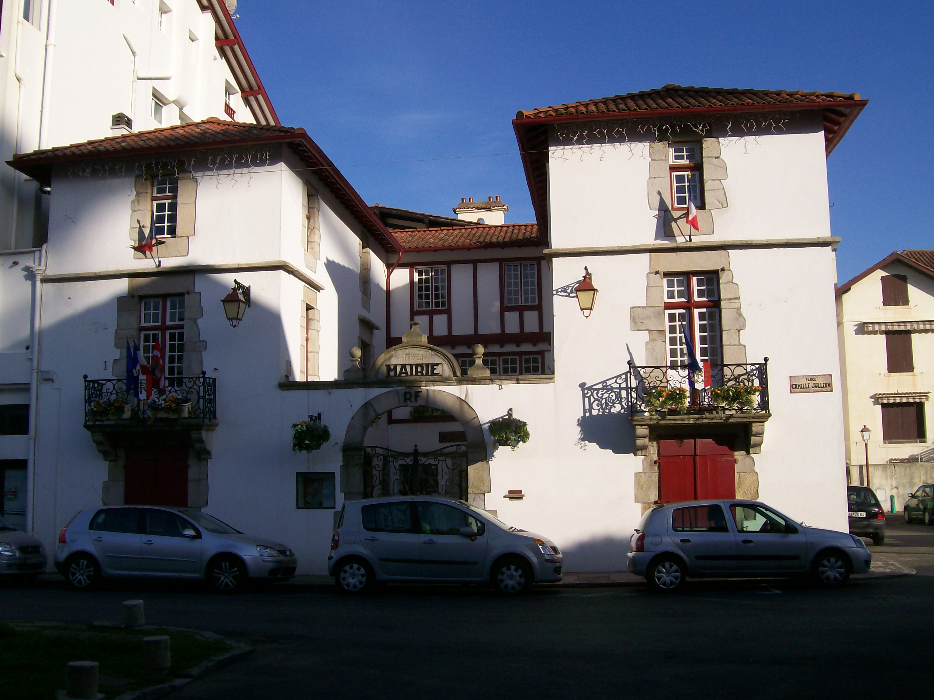 Ziburuko Herriko Etxea